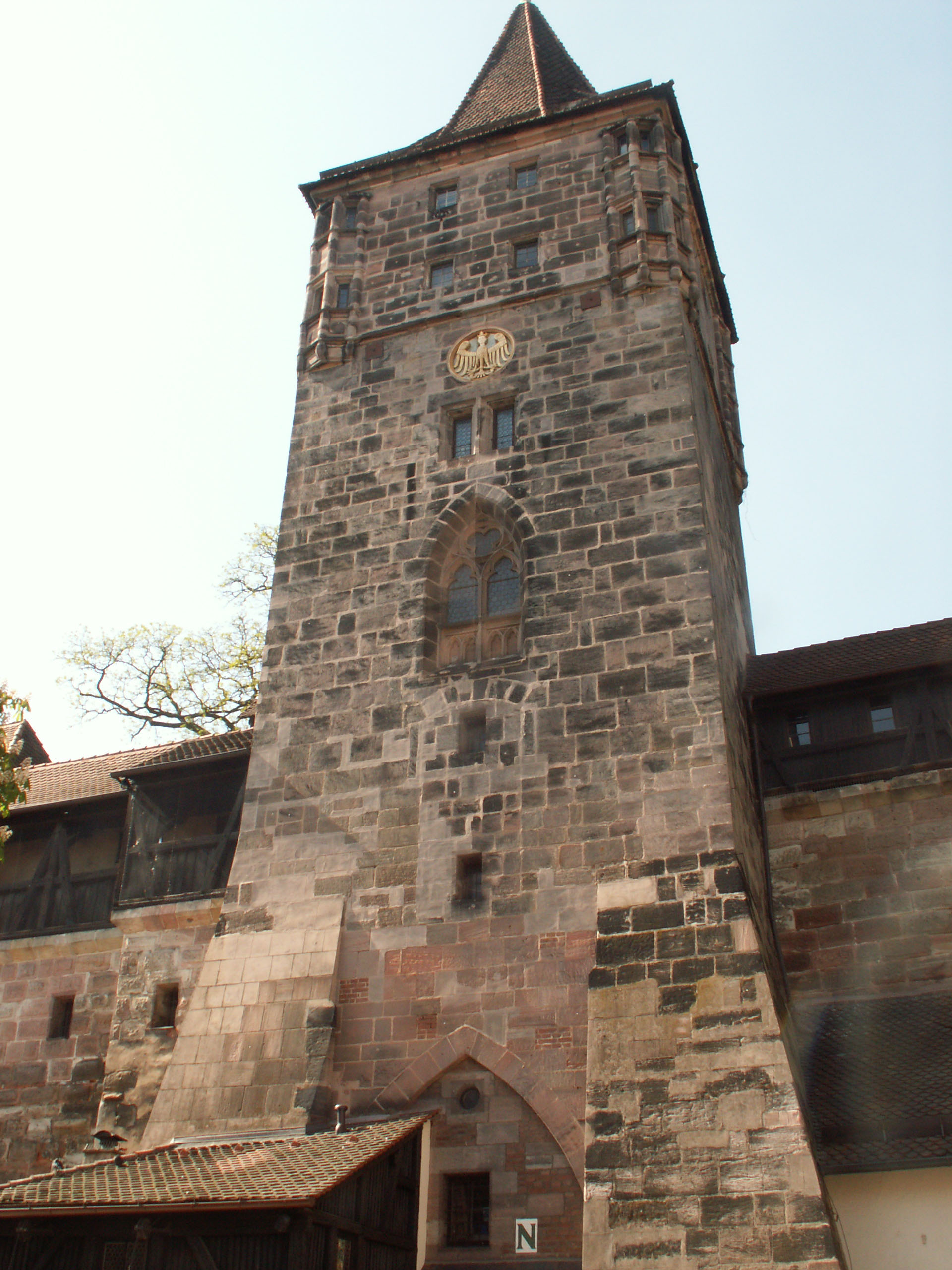 Aufgenommen auf einem Rundgang durch Nuernbergs Altstadt. Weitere Infos unter froutes Freizeitrouten.